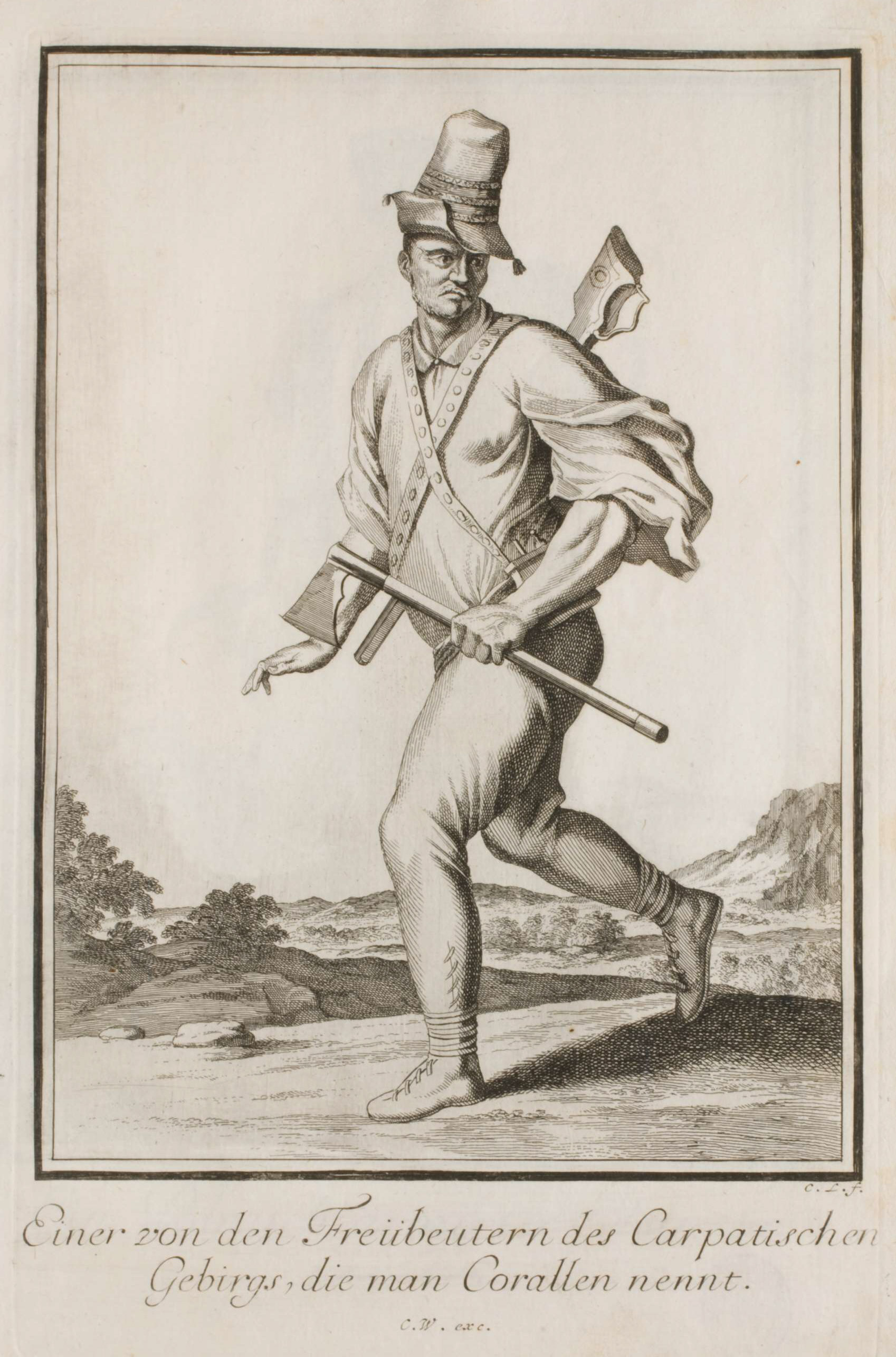 Neu-eröffnete Welt-Galleria. ..., Nürnberg 1703. 67. Einer von den Freübeutern des Carpatischen Gebirgs, die man Corallen nennt.